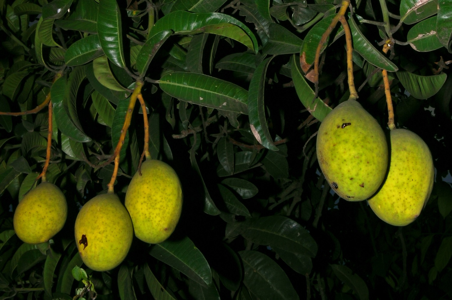 Mangifera odorata, unripe fruits. Pandeglang, Banten (west Java), Indonesia